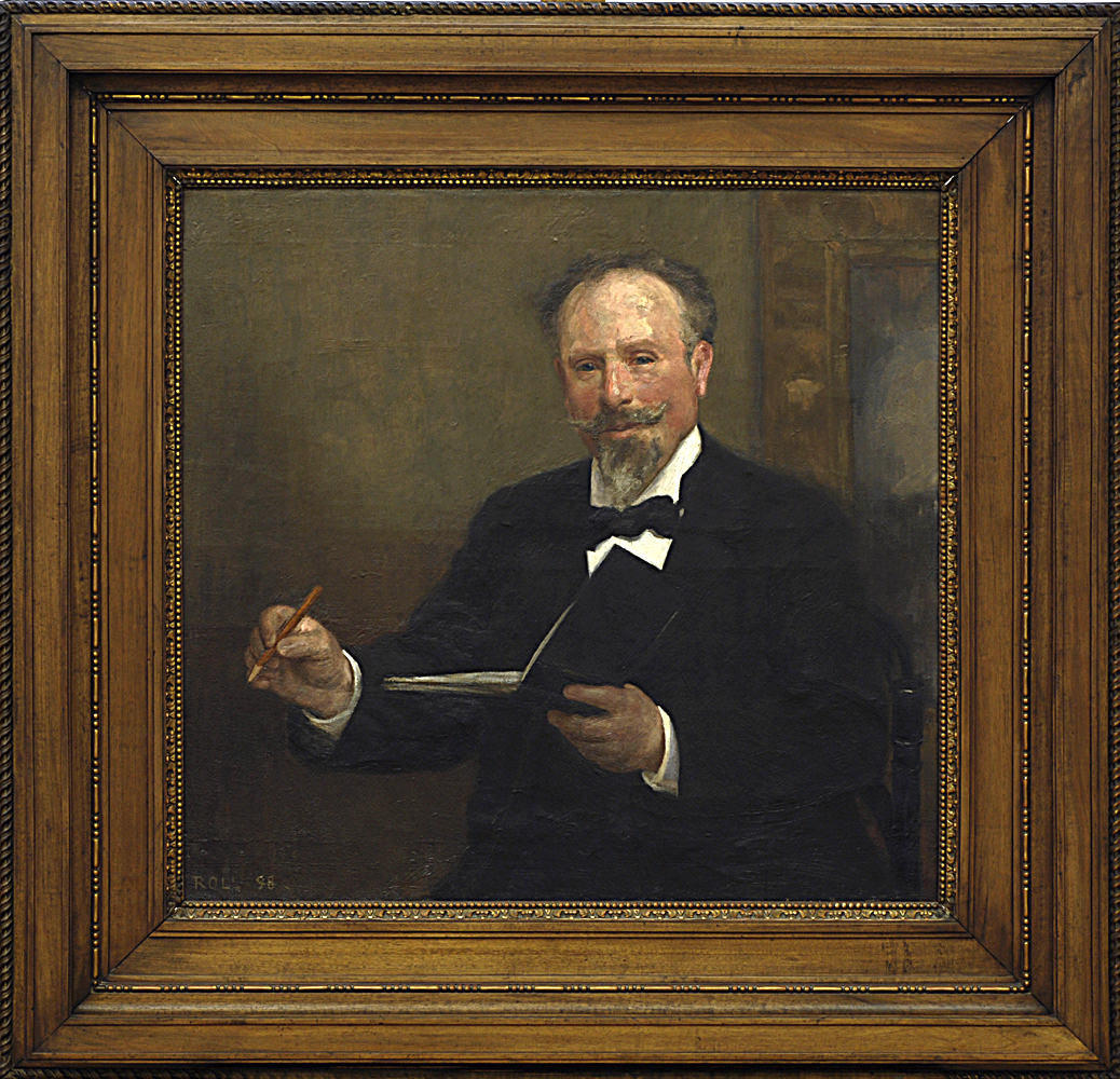 Portrait d'Alfred Smith